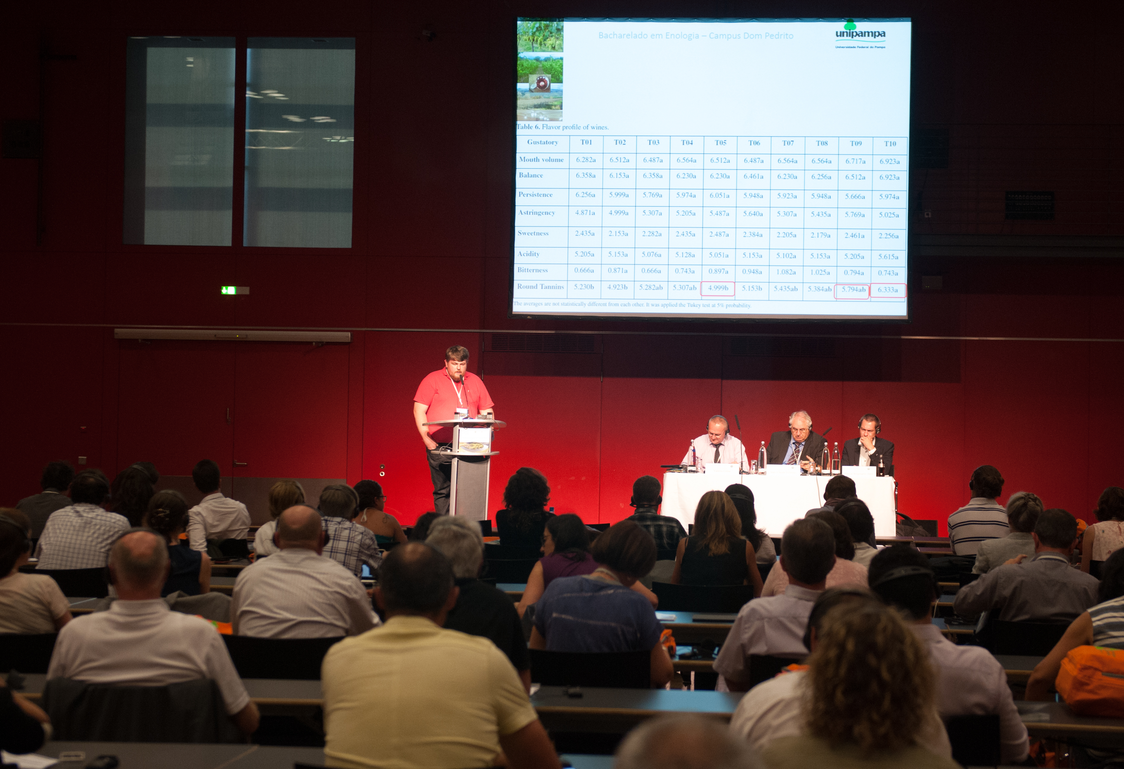 38th World Congress of Vine and Wine in Mainz - 38. Weltkongress für Rebe und Wein 5.-10. Juli 2015 in Mainz, Rheingoldhalle